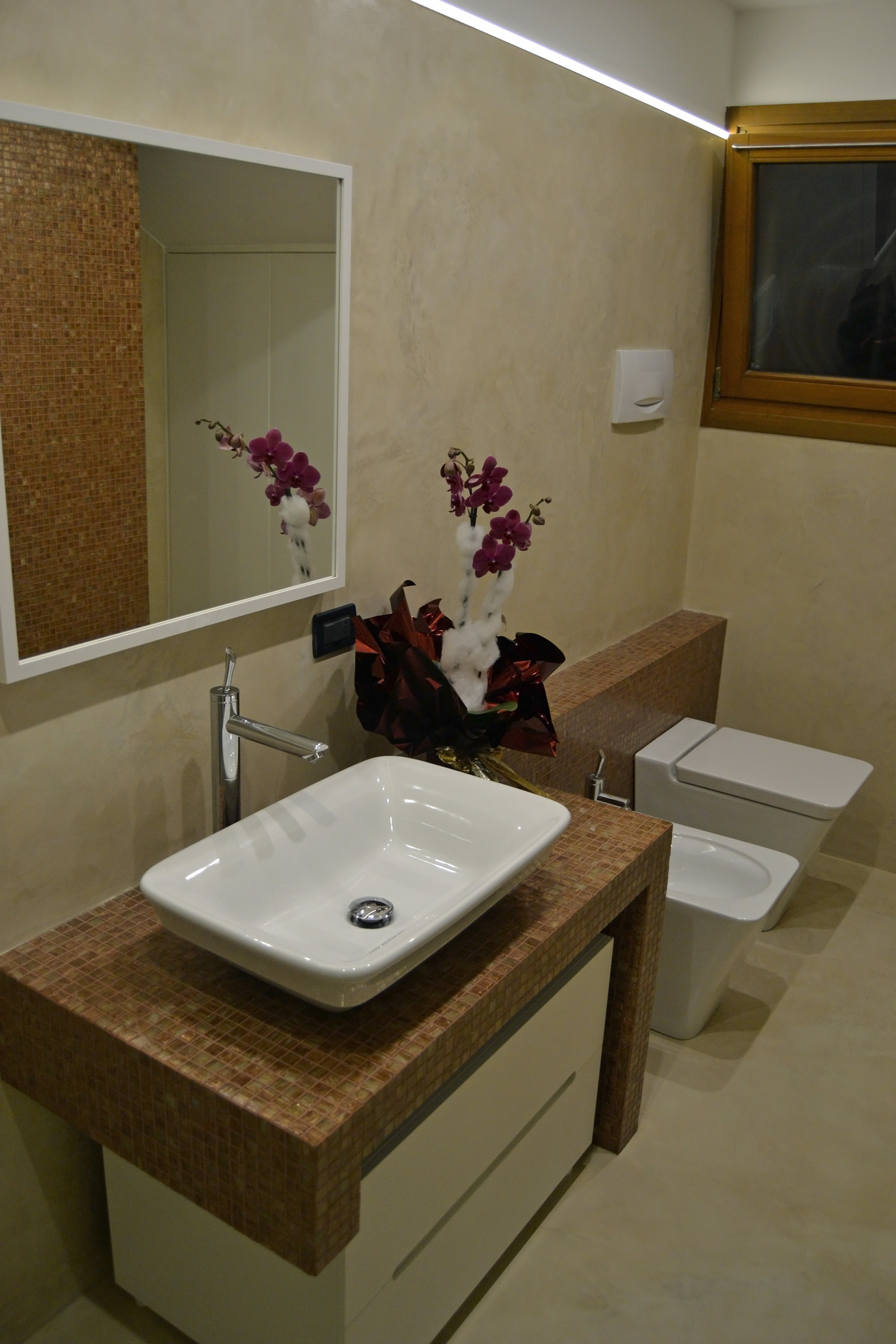 Bagno rivestito con resina microcementizia (microcemento o microtopping). Via Gioacchino Rossini, 1 - 37045 Legnago (VR).